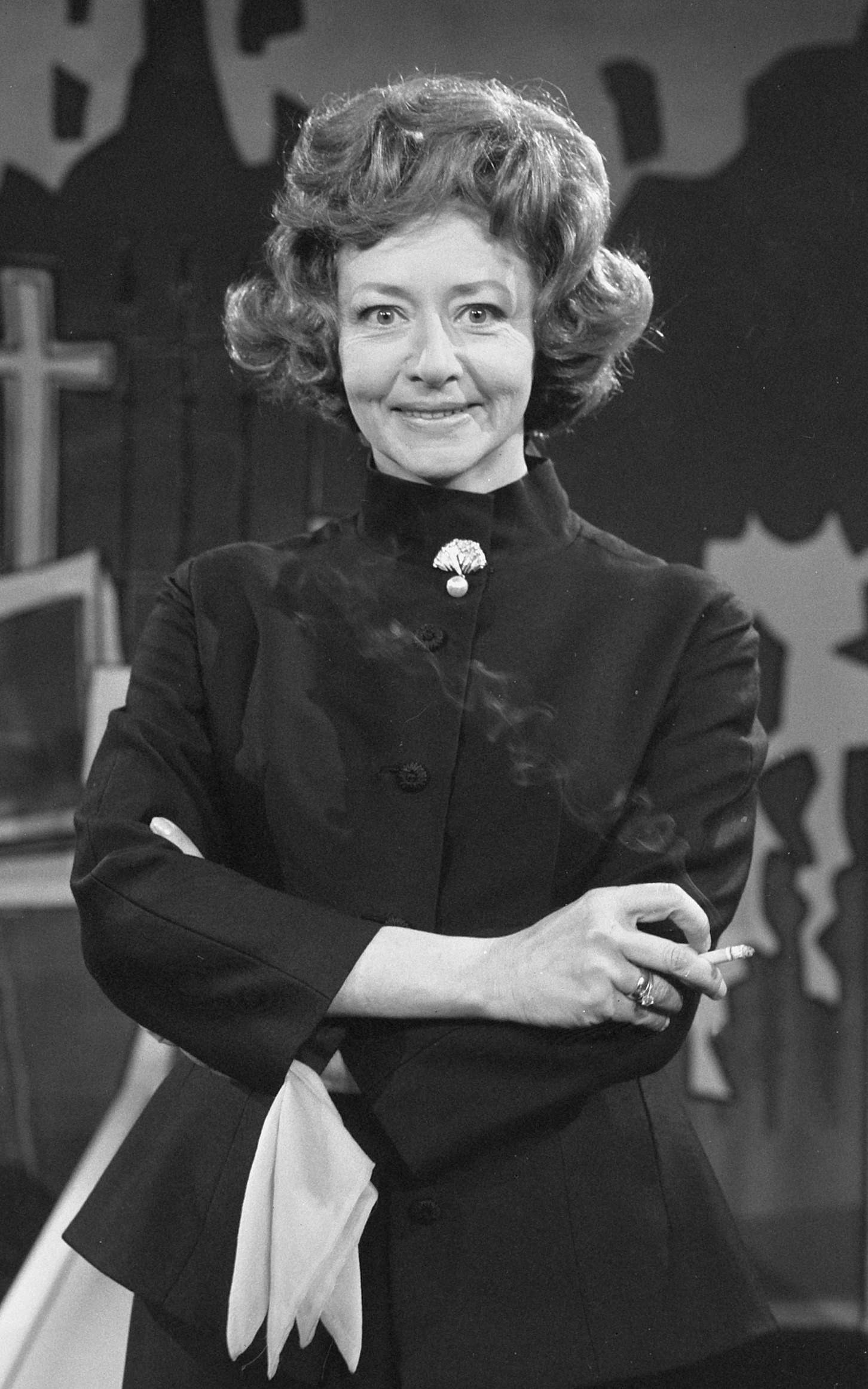 Das Kommödchen (Duits cabaretgezelschap uit Düsseldorf) in Nederland, Lore Lorentz tijdens de TV-opname